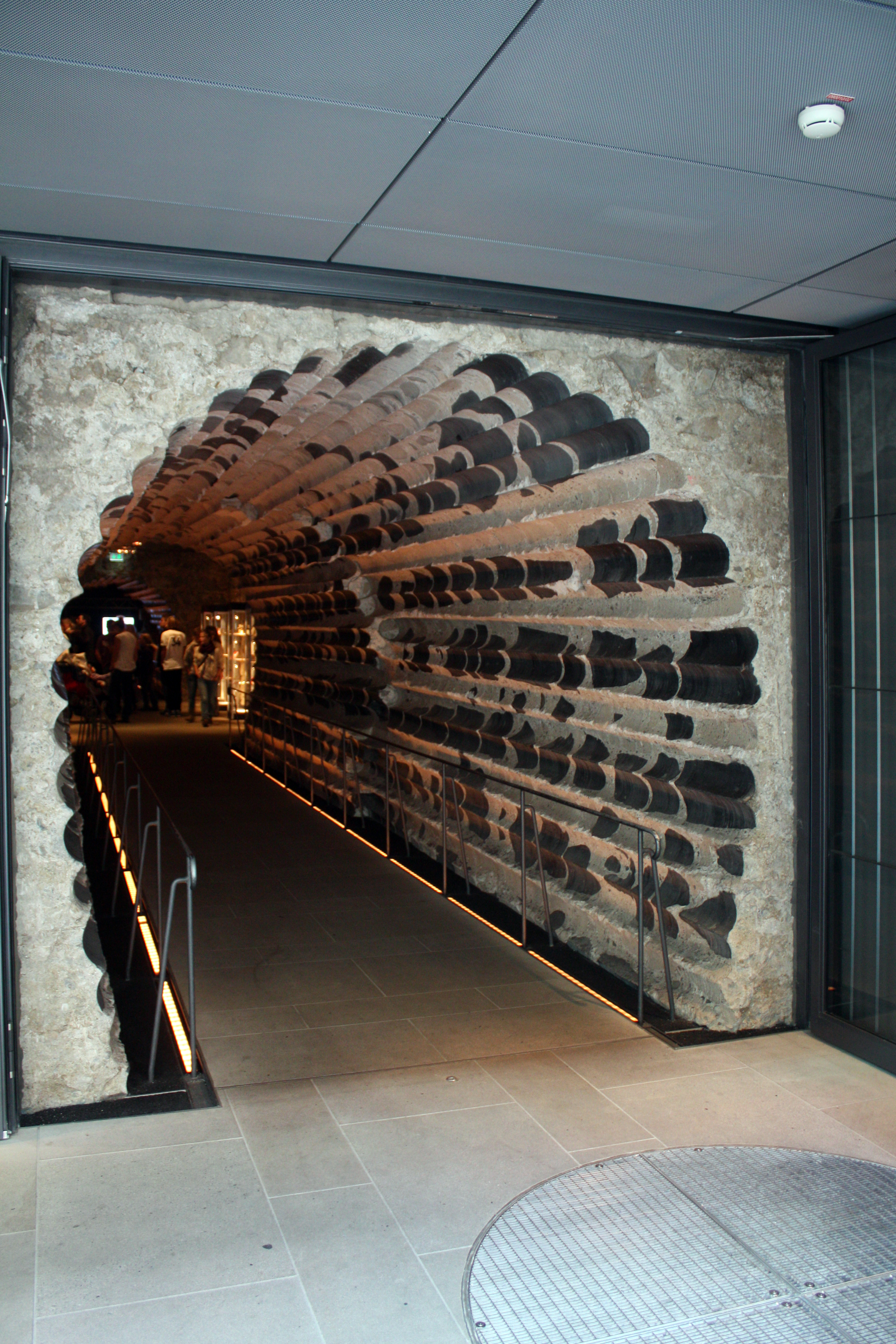 Kölner Dom, Zugangsbohrung Domfundament